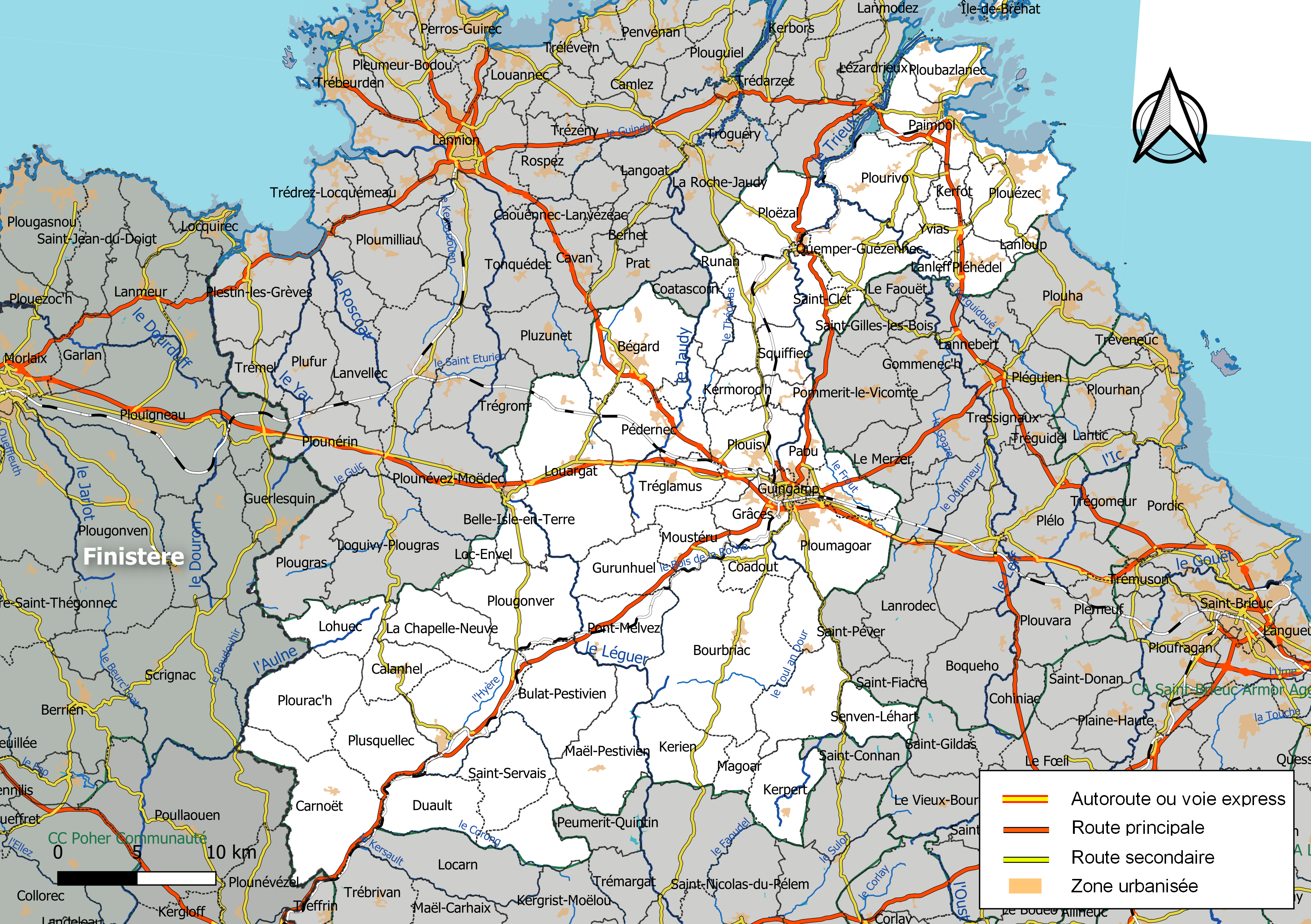 Carte géographique de l'intercommunalité Guingamp-Paimpol Agglomération, département des Côtes-d'Armor, France. Composition au 1er janvier 2019.